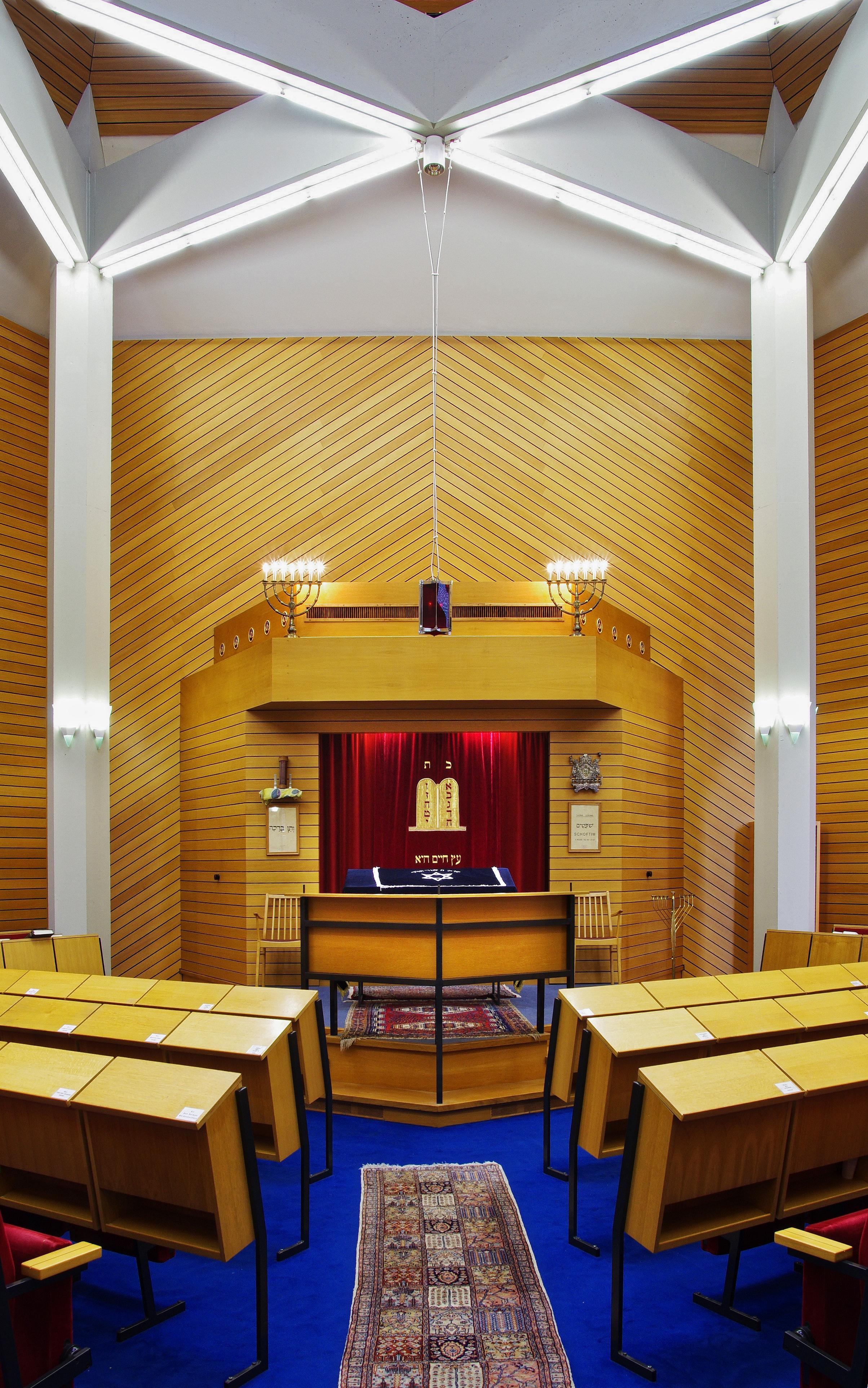 Technisches Rathaus Freiburg